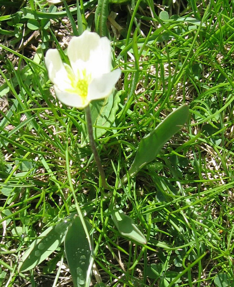 Renoncule de Küpfer (Ranunculus kuepferi) : Ubaye - France (05)